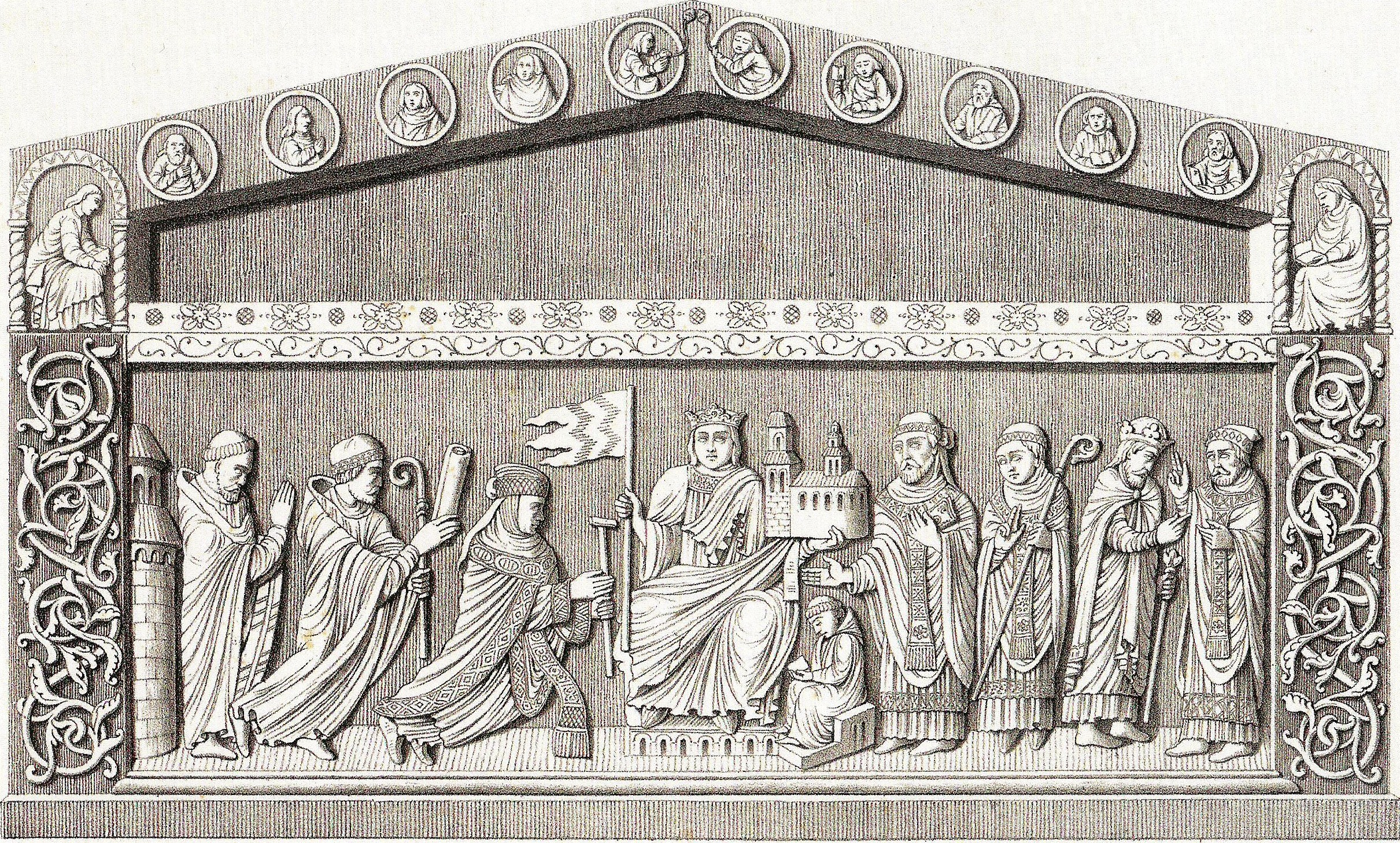 cf le titre.